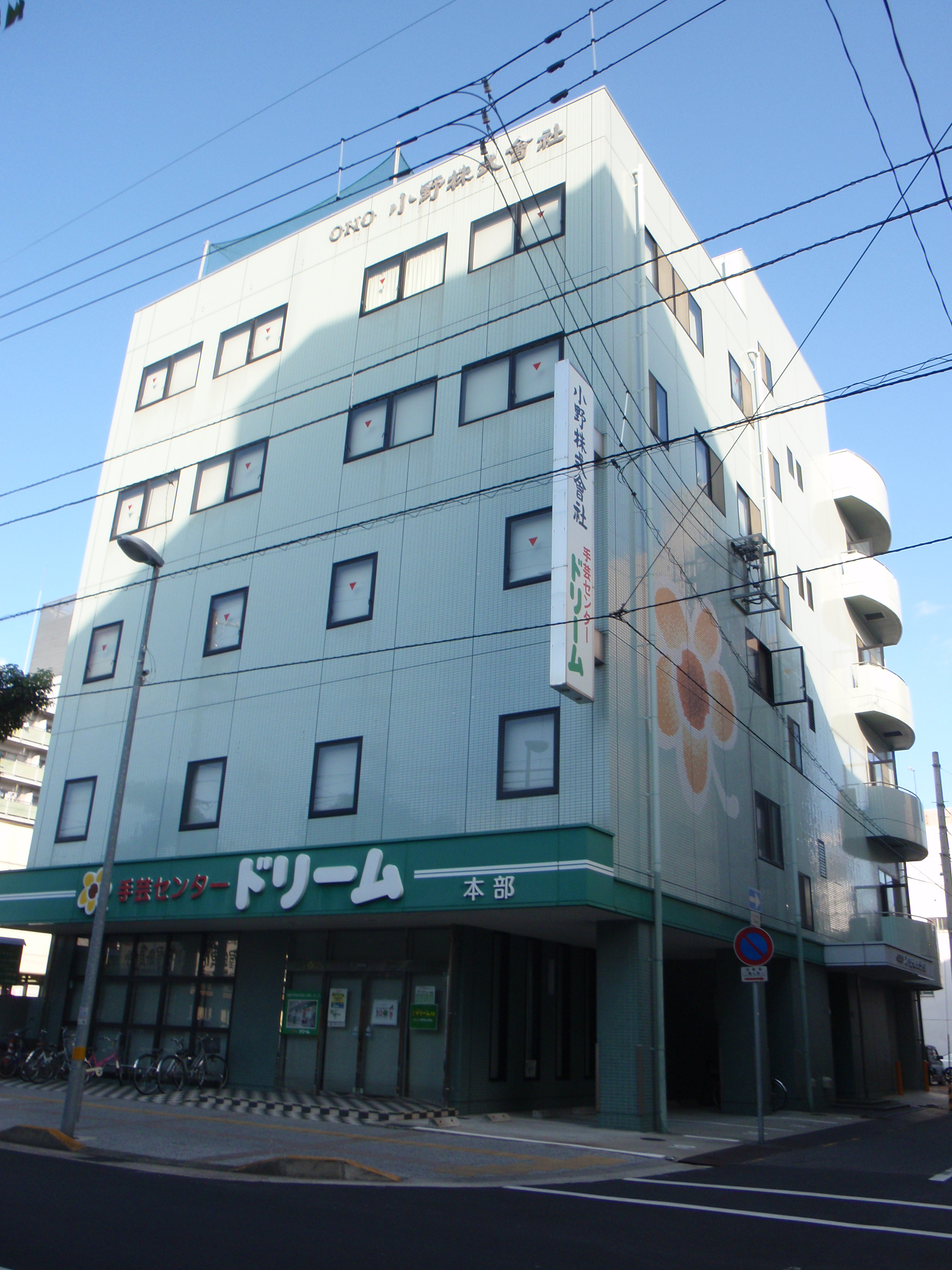 香川県高松市塩屋町にある小野株式会社の本社。